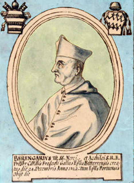 Cardinal Béranger Frédol l'Ancien